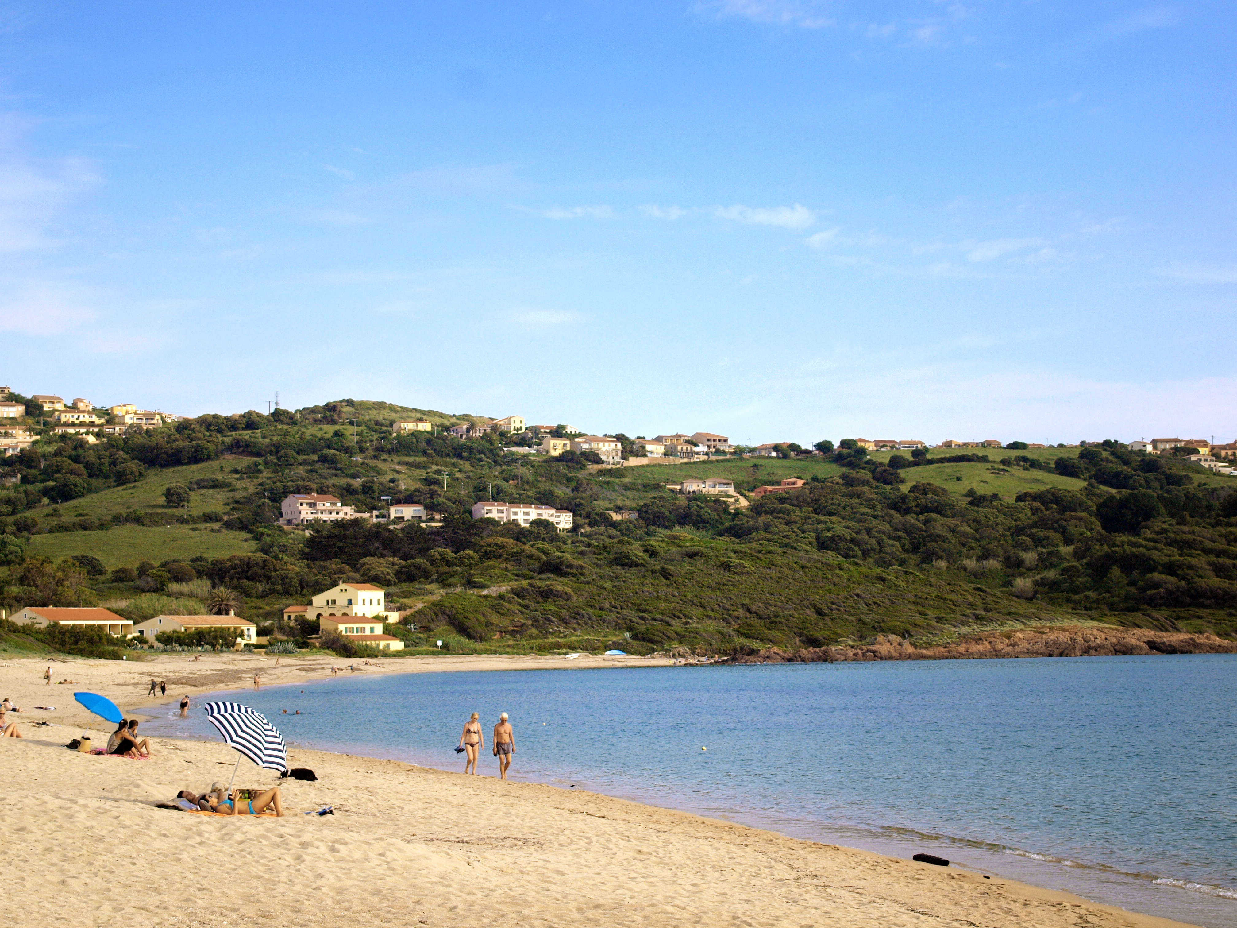 Cargèse, Ouest Corse (Corse) - Plage de Peru au fond du golfe éponyme